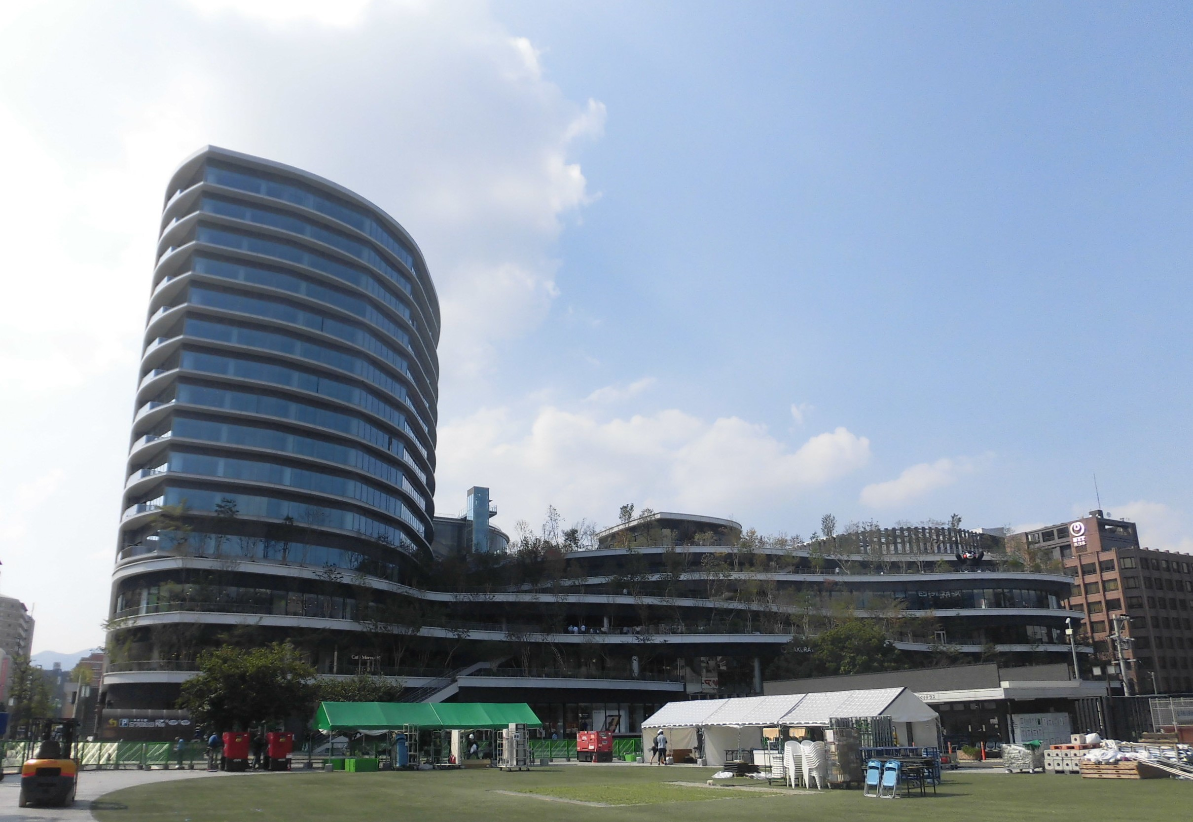 熊本市にあるサクラマチクマモト